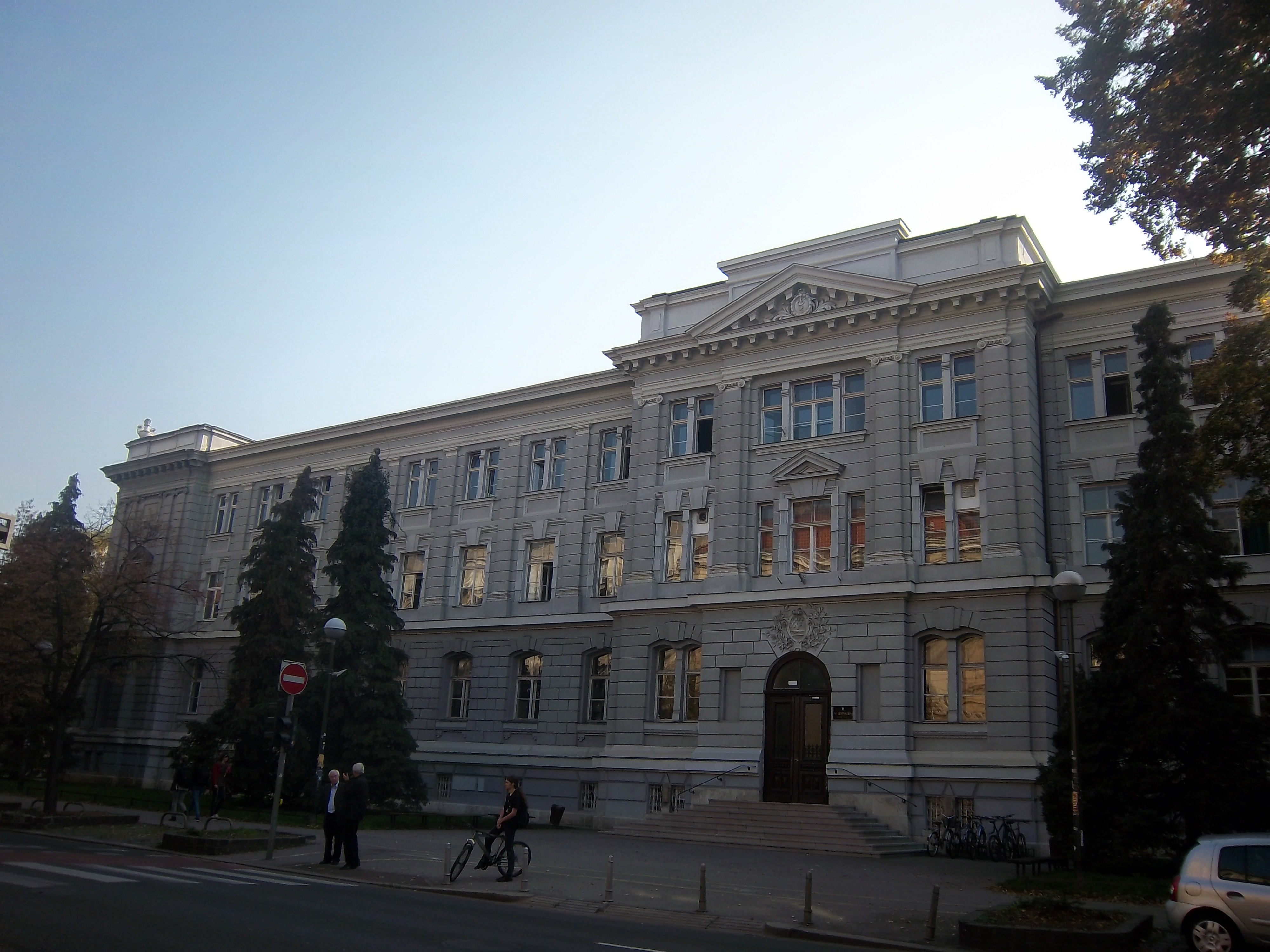 Srpskohrvatski / српскохрватски: Zgrada V. gimnazije u Zagrebu